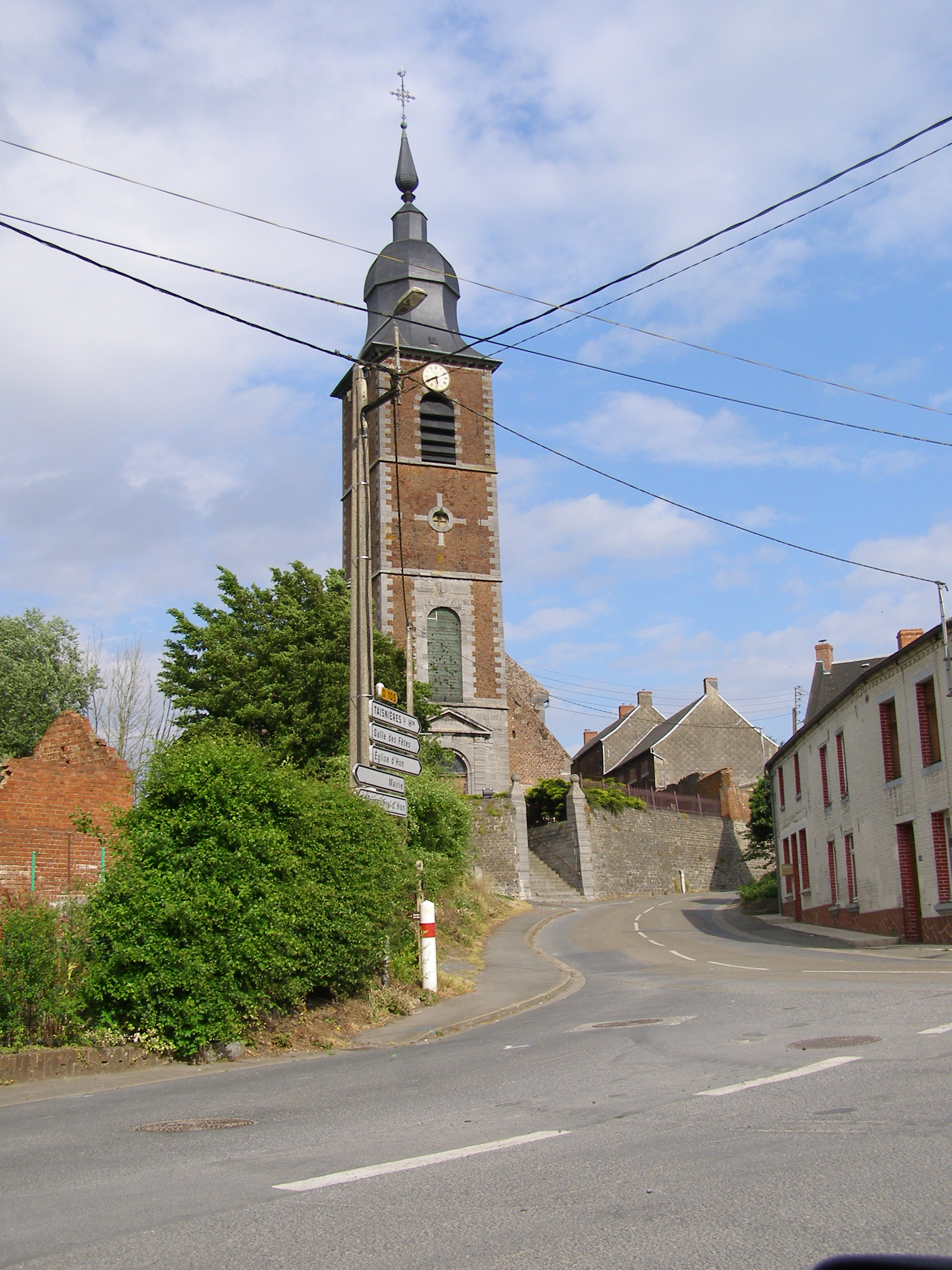 église paroissiale Saint-Martin de Hon This building is indexed in the Base Mérimée, a database of architectural heritage maintained by the French Ministry of Culture, under the references IA59000663 and type .